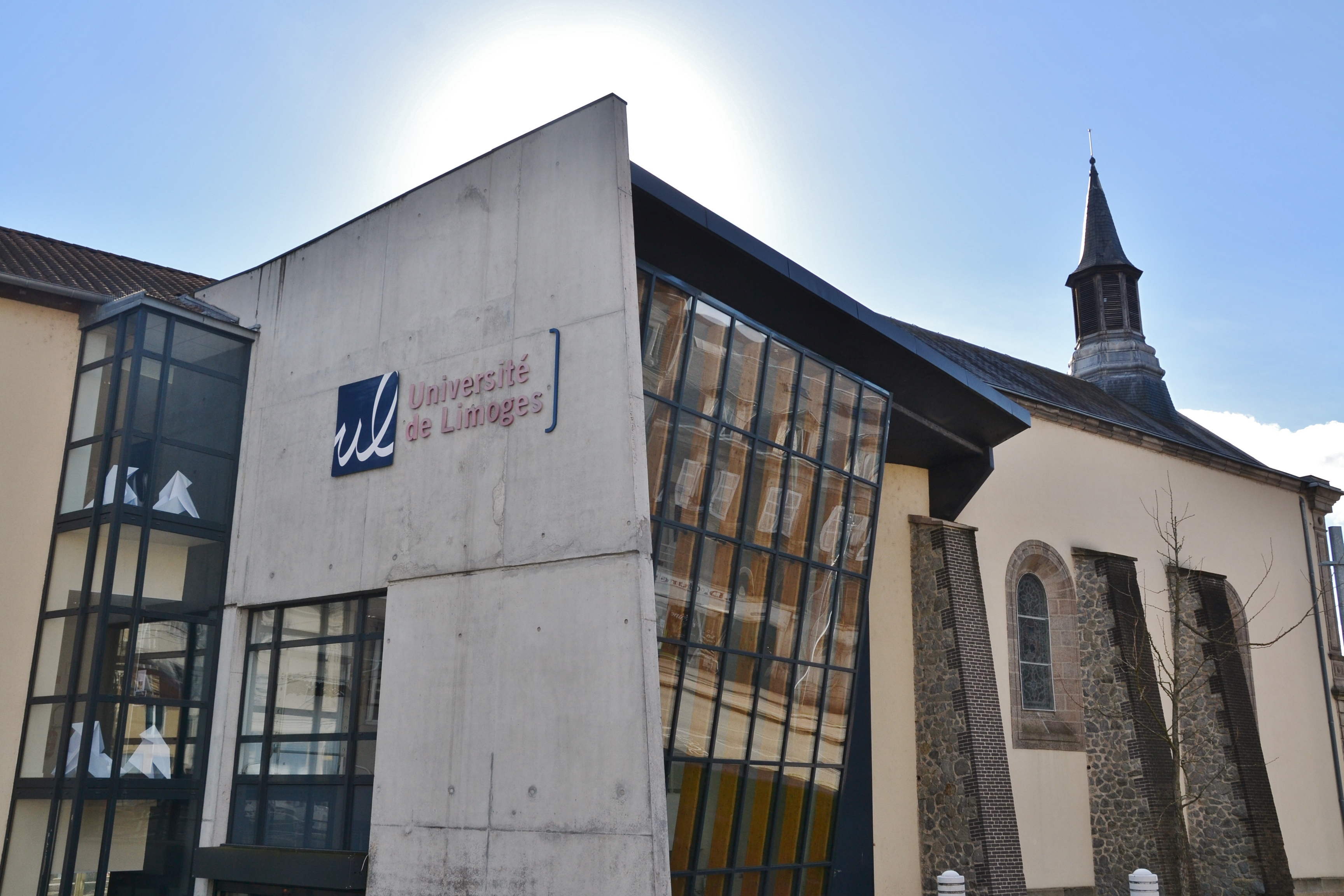 Services centraux de l'Université de Limoges (Haute-Vienne, France)